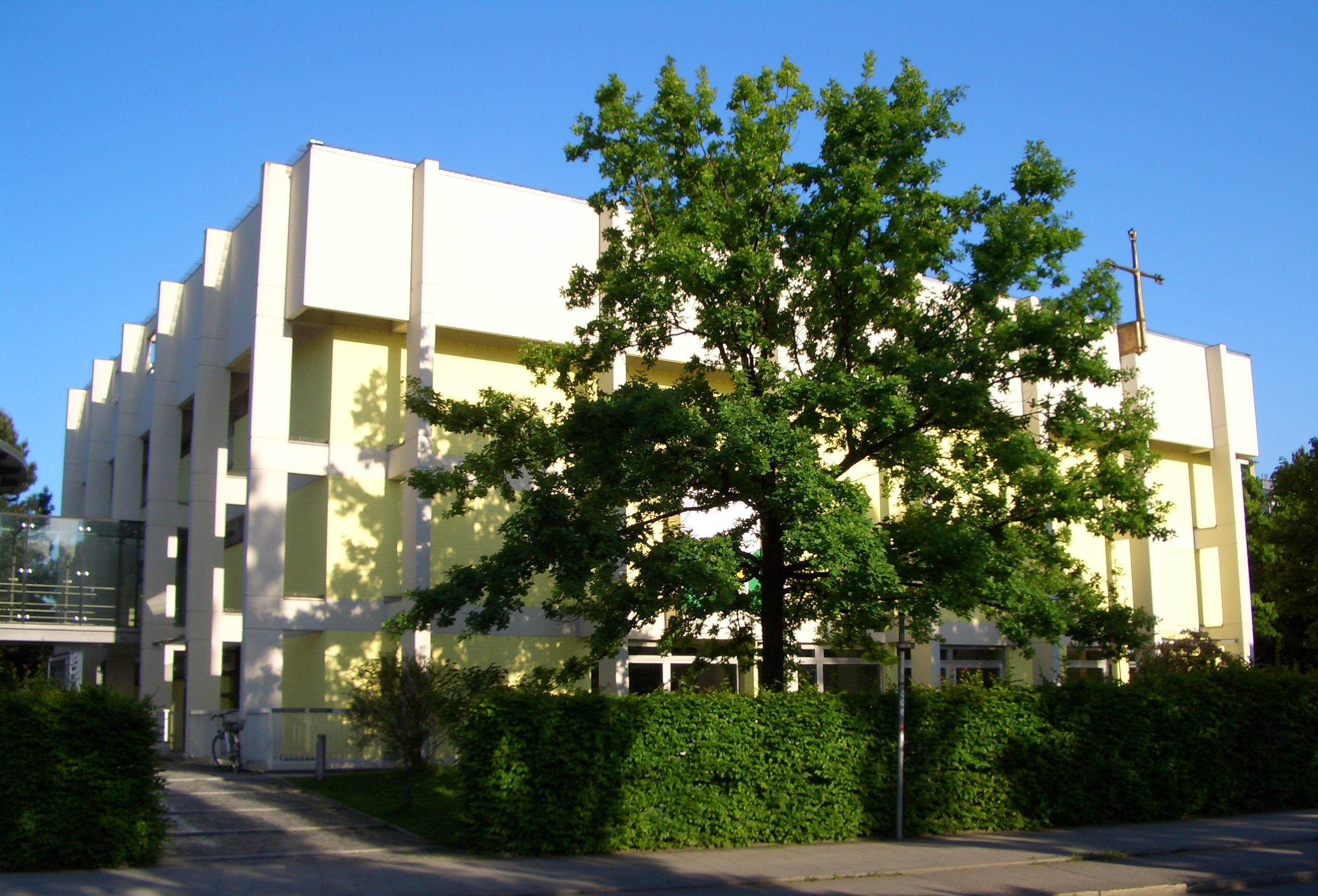 St. Thomas Muenchen-Oberfoehring Suedtrakt